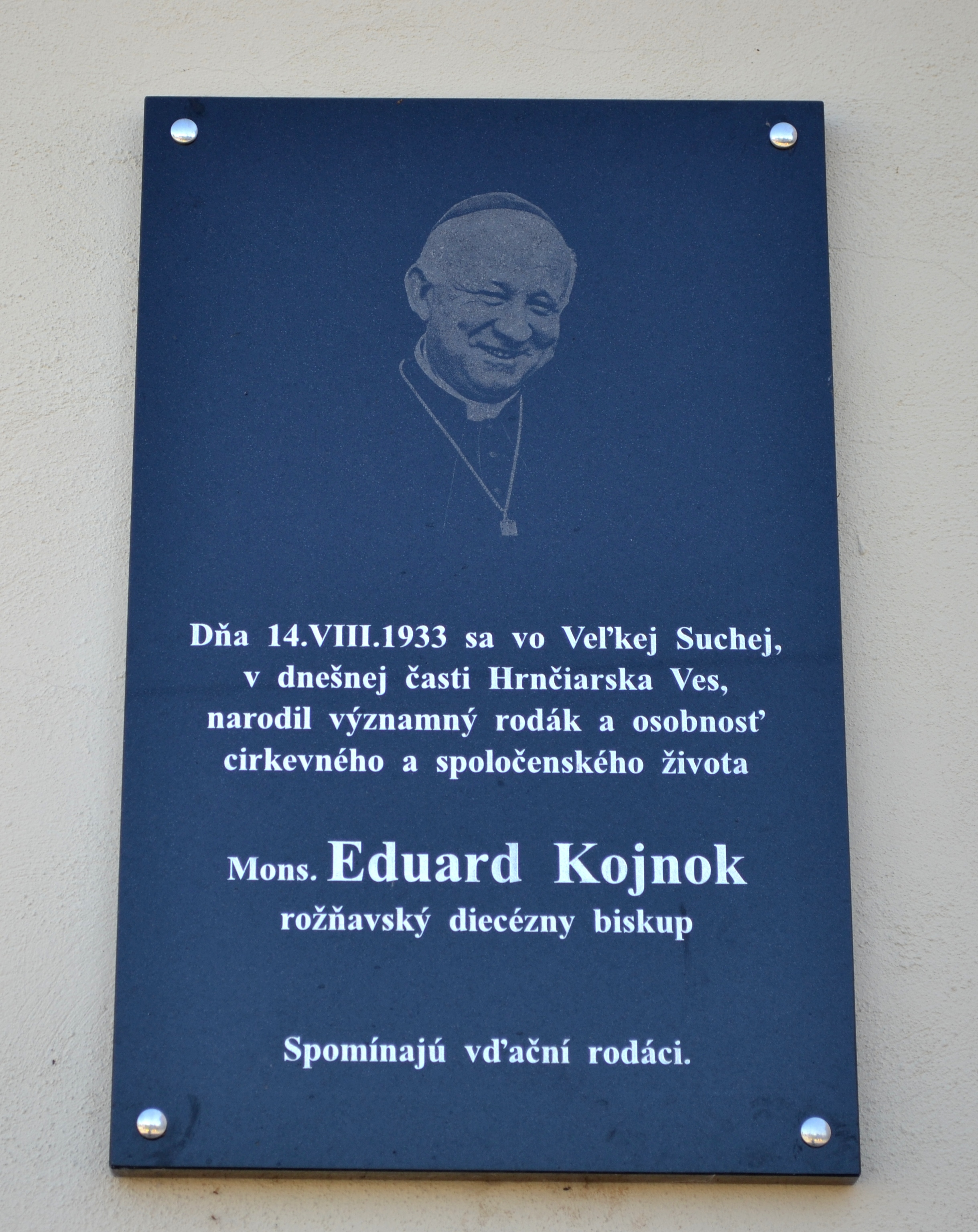 Veľká Suchá (časť obce Hrnčiarska Ves), pamätná tabuľa (na farskej budove) rodáka obce Mons. Eduarda Kojnoka, rímskokatolíckeho biskupa